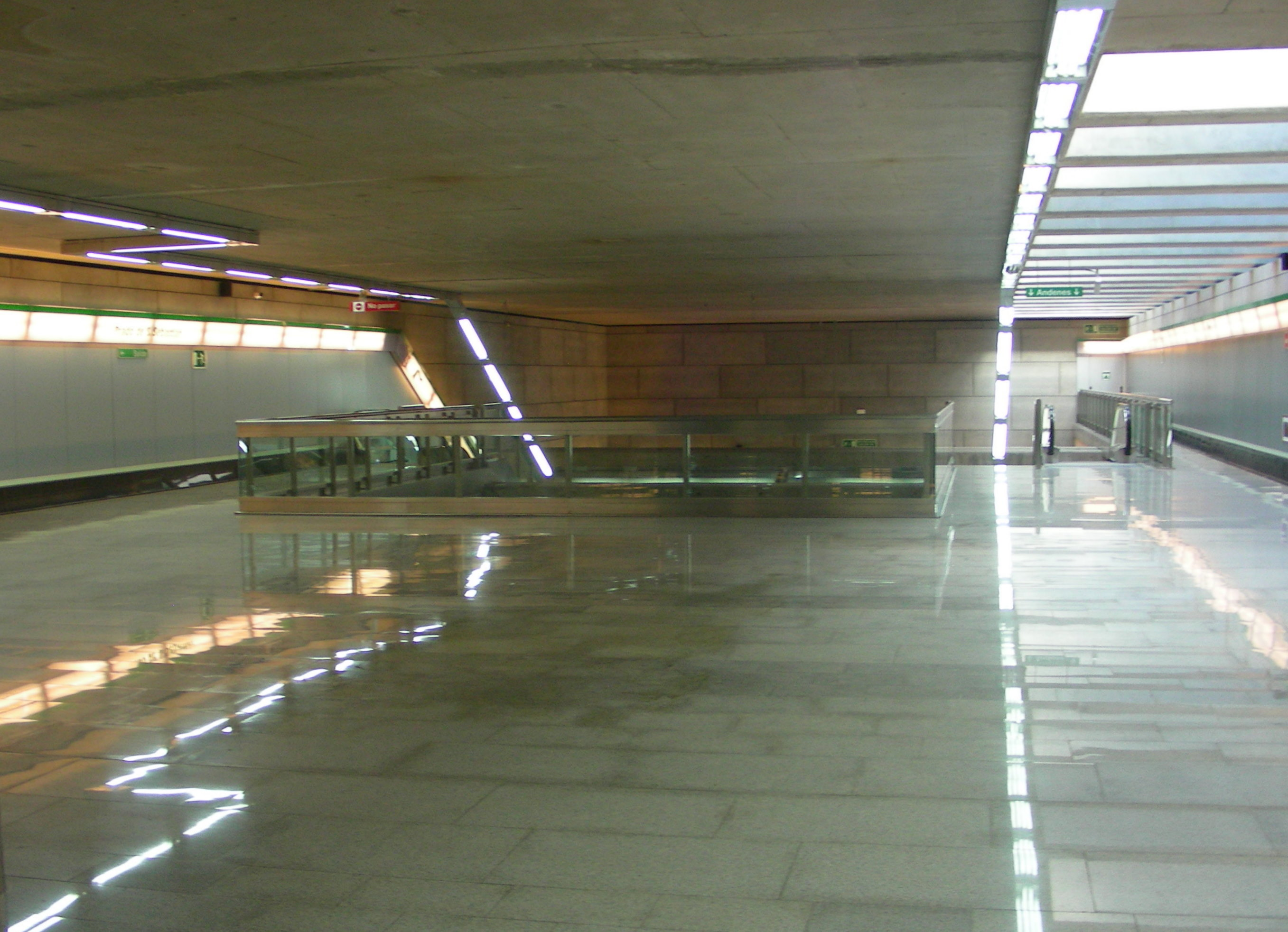 Vestíbulo de distribución de la estación Puerta De Jeréz, en el metro de Sevilla. Agosto de 2009